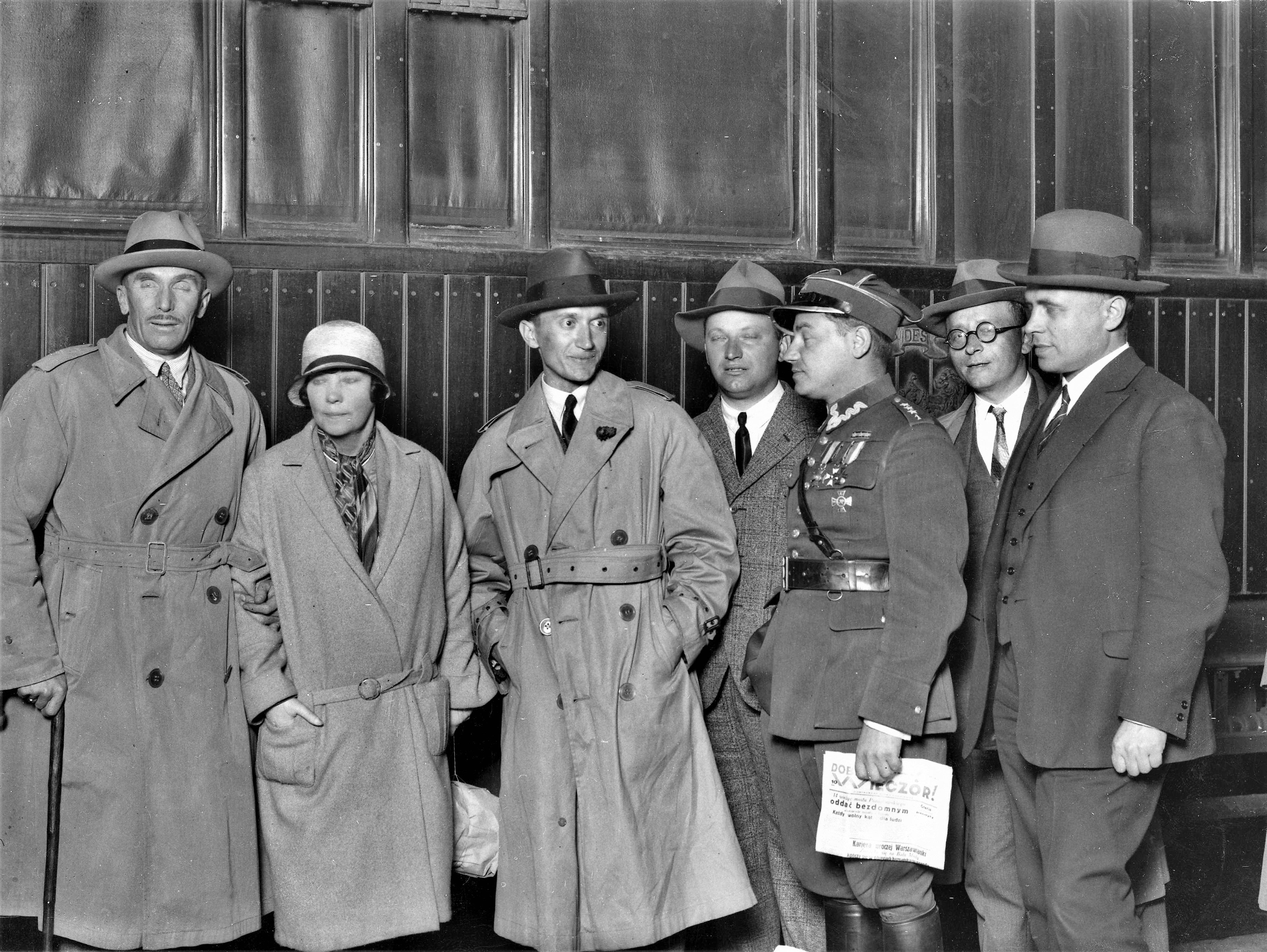 Wyjazd oficerów WP do Stanów Zjednoczonych na odsłonięcie pomnika Kazimierza Pułaskiego. Na Dworcu Głównym w Warszawie wyjeżdżających ppłk Piotra Głogowskiego i por. Zarychtę żegna kpt. Mieczysław Lepecki (w mundurze).